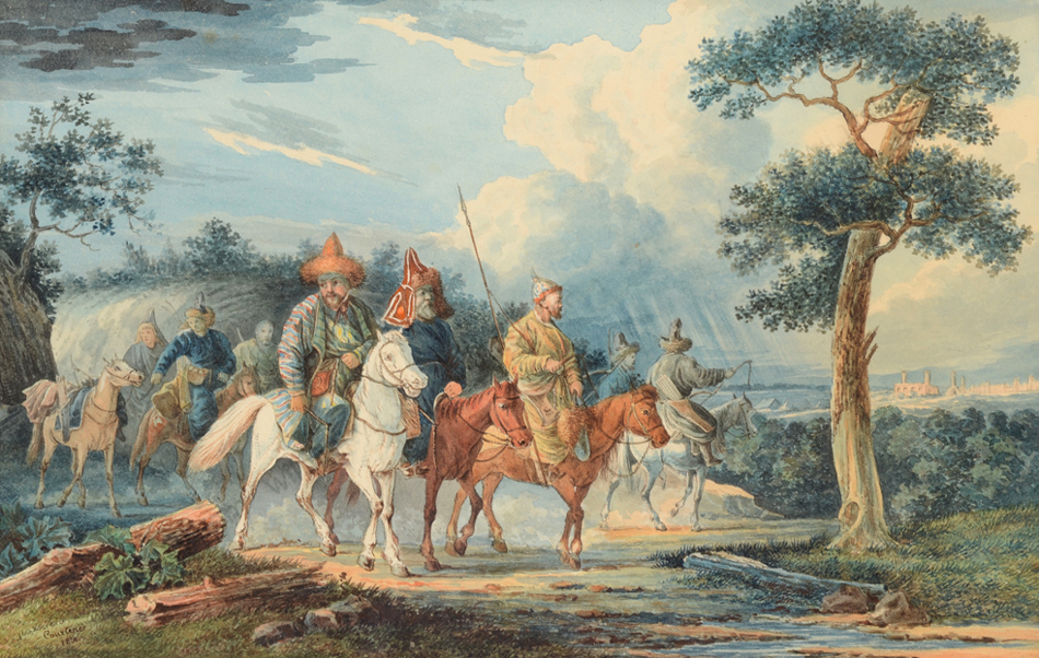 Башкирские казаки в Европе, 1813 год